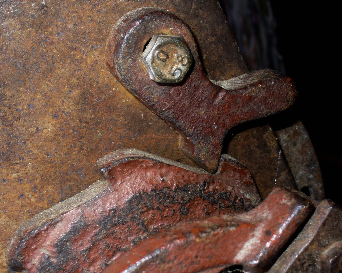 Храповой механизм ручной лебёдки